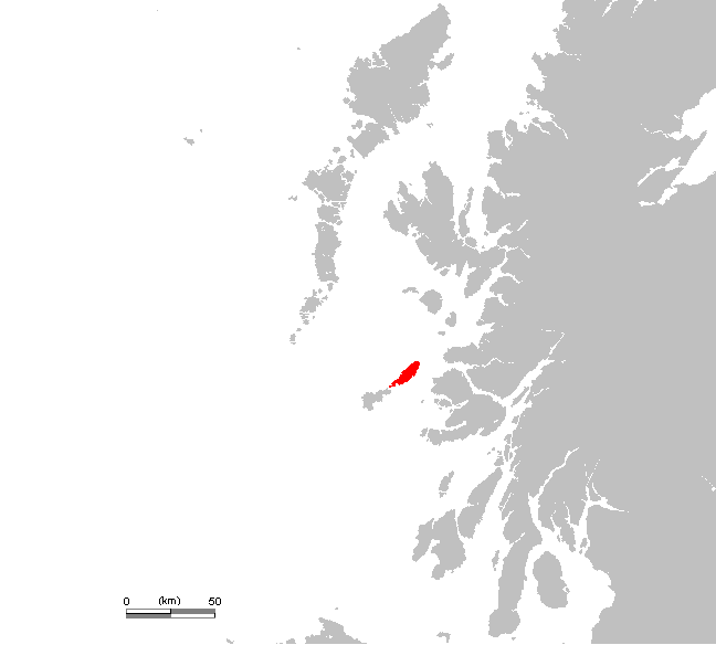 Description:Carte de l'île de Coll en Ecosse, royaume-Uni *Auteur:Rémih